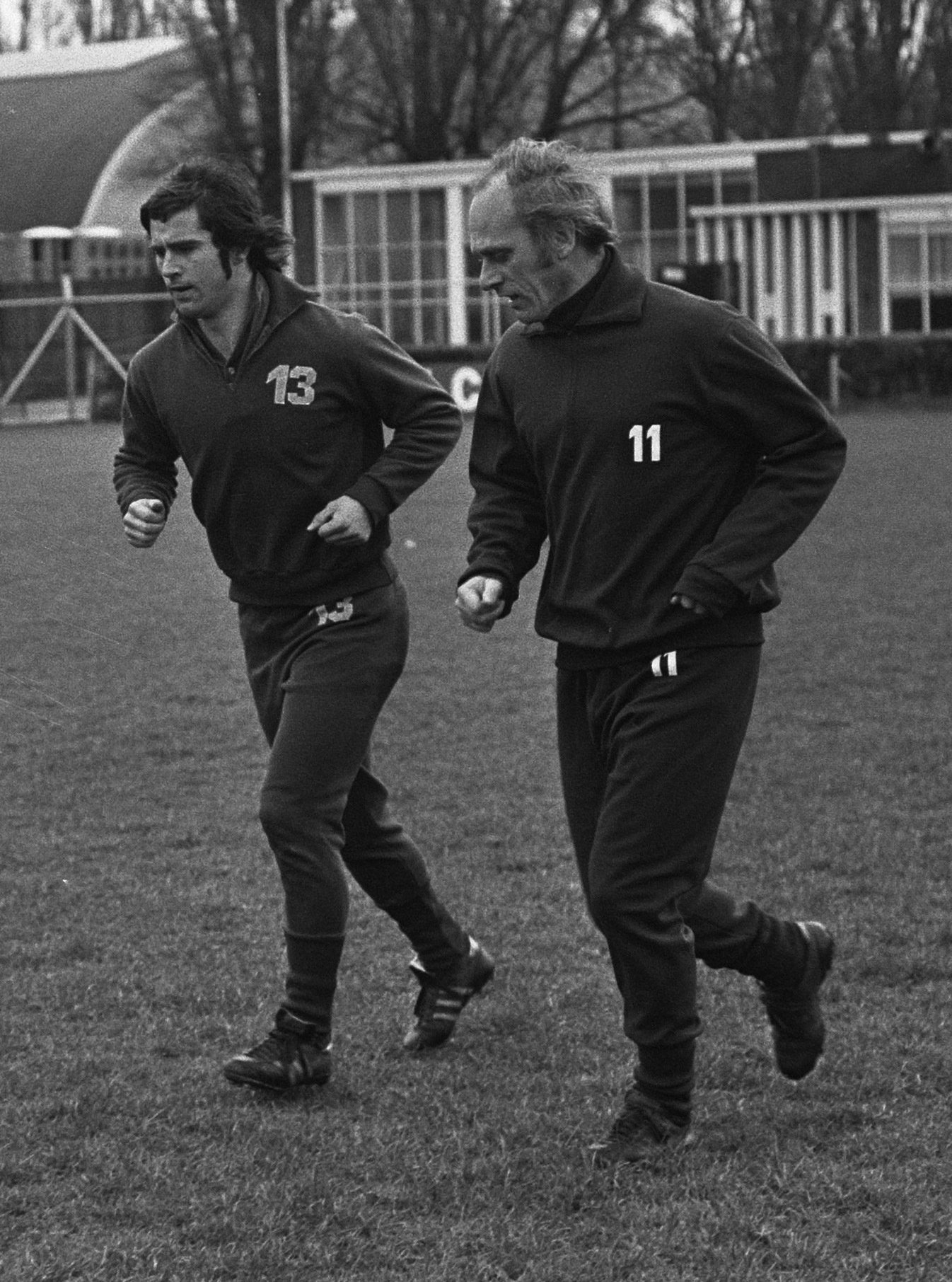 Collectie / Archief : Fotocollectie Anefo Reportage / Serie : [ onbekend ] Beschrijving : Bayer-Munchen traint in Olympisch Stadion, G. Muller en trainer Udo Katlek Datum : 6 maart 1973 Trefwoorden : sport, voetbal Persoonsnaam : G. Muller Fotograaf : Mieremet, Rob / Anefo Auteursrechthebbende : Nationaal Archief Materiaalsoort : Negatief (zwart/wit) Nummer archiefinventaris : bekijk toegang 2.24.01.05 Bestanddeelnummer : 926-2636